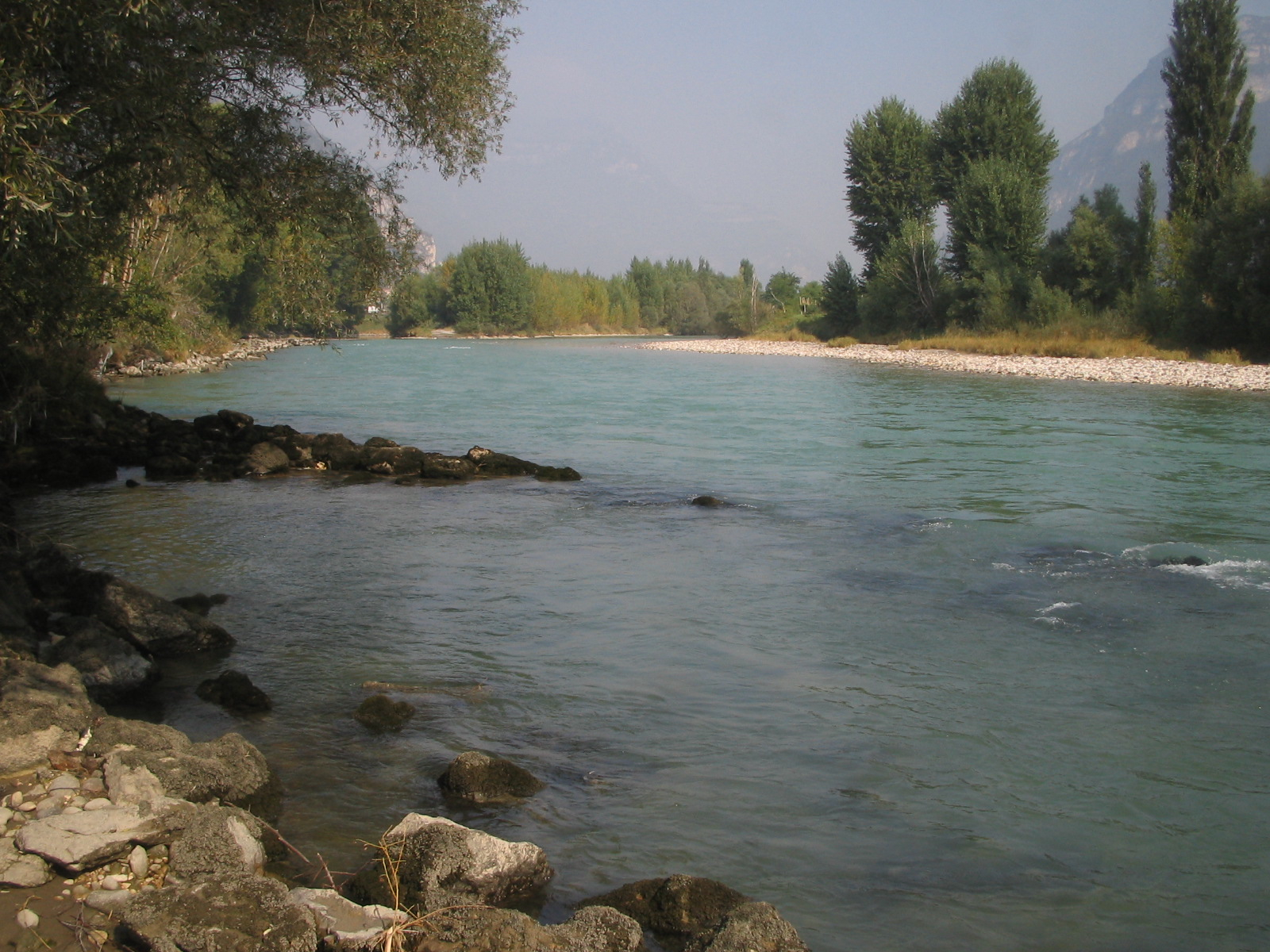 Il Fiume in vallagarina